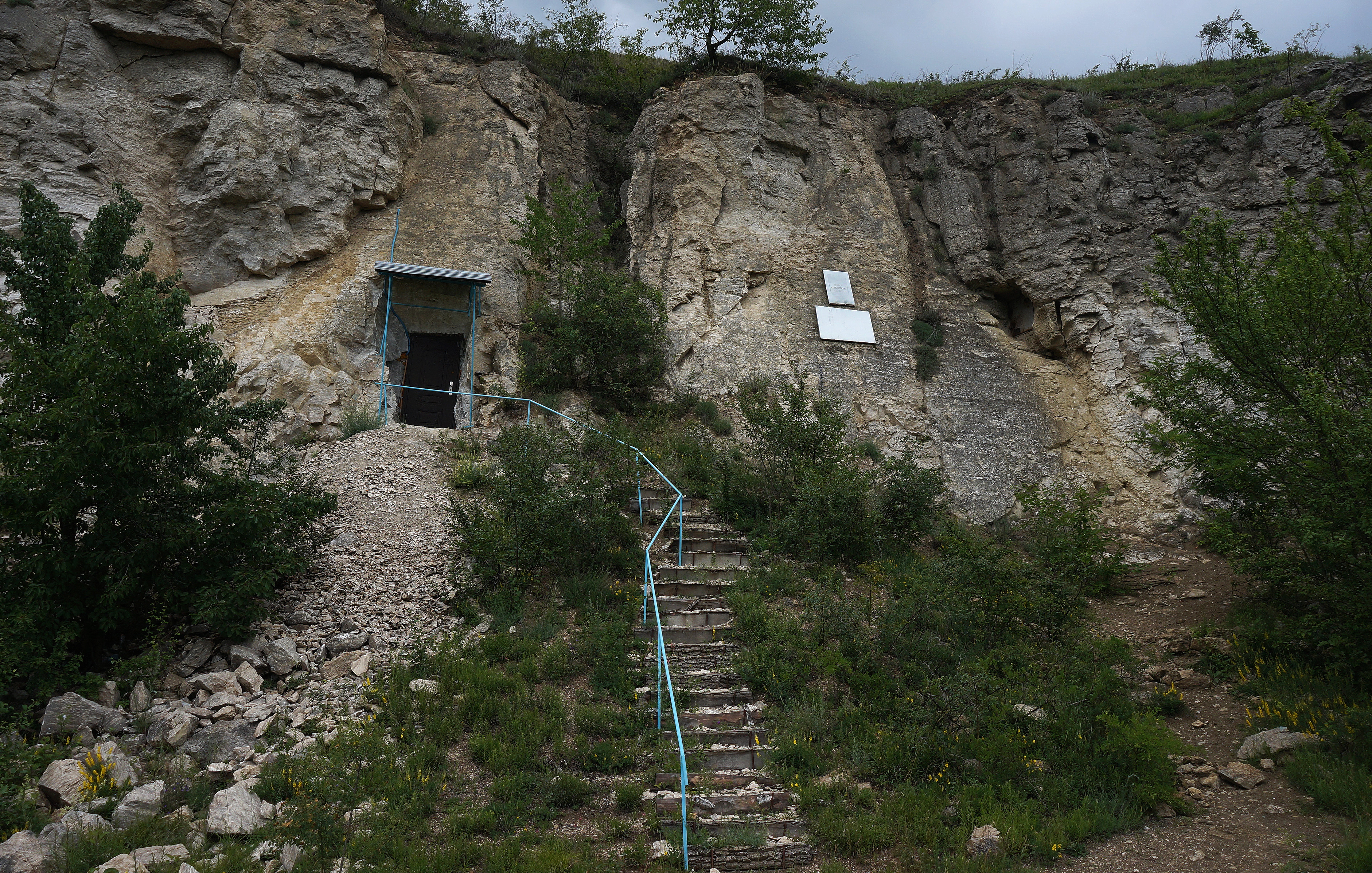 Печера Атлантида, Кам'янець-Подільський район, поблизу с. Завалля